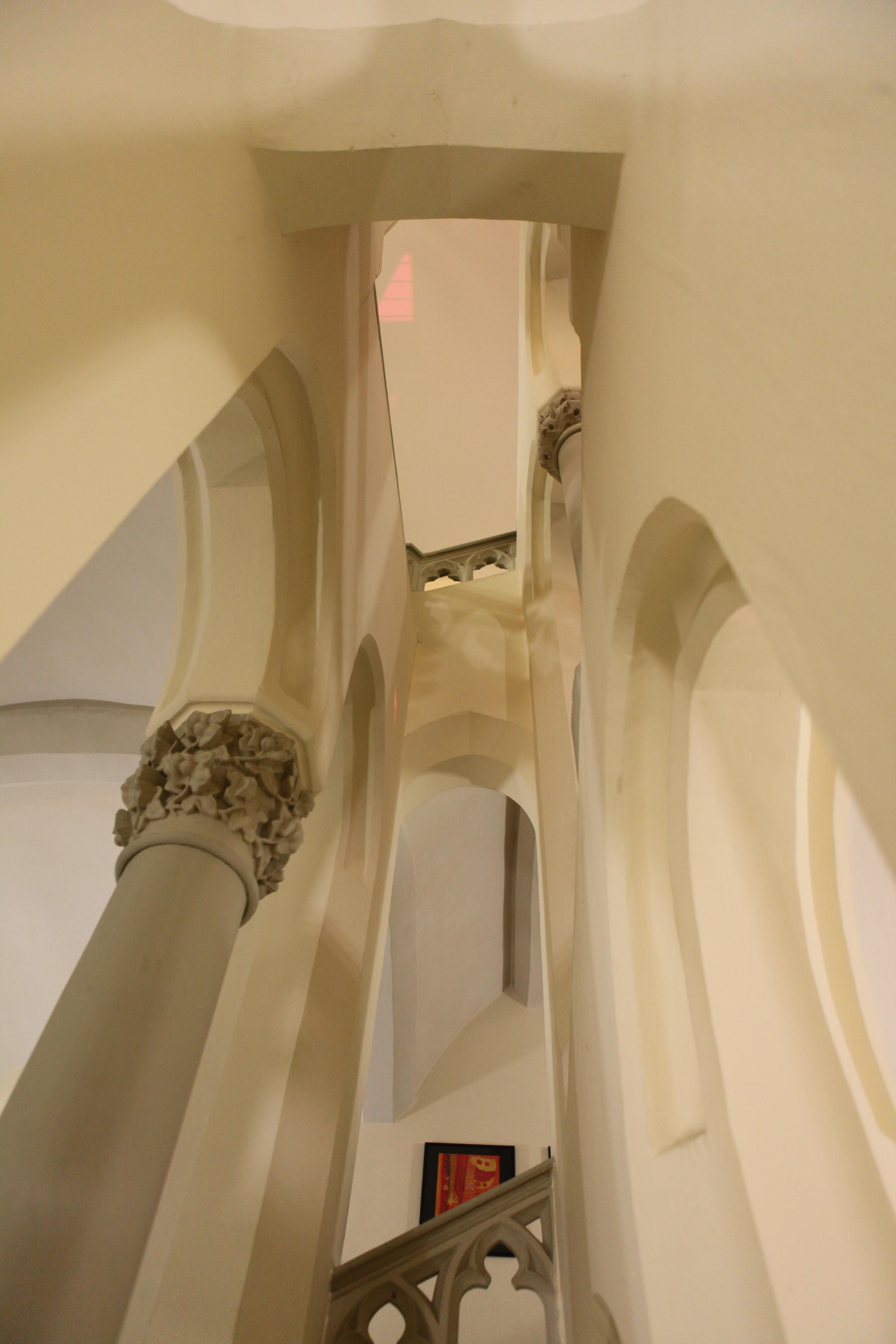 Treppenhaus der Lutherschule in Coburg